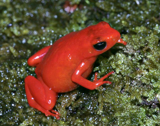 Mantella aurantiaca Nouvelle version de File:Mantella aurantiaca01a.jpg : modification des niveaux.